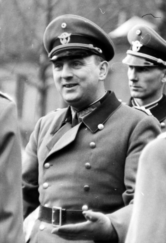 General der Polizei Daluege, Hauptmann d. Sch. Besch (2. Adjudant)